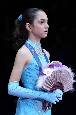 Евгения Медведева на Финале Гран При 2013 - Подиум